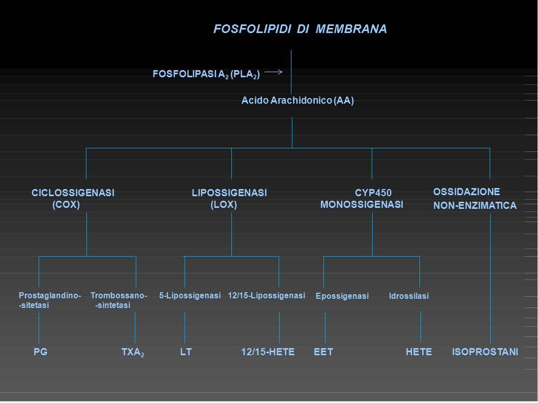 Creazione personale del 25/10/2016, metabolismo acido arachidonico, licenza di pubblico dominio